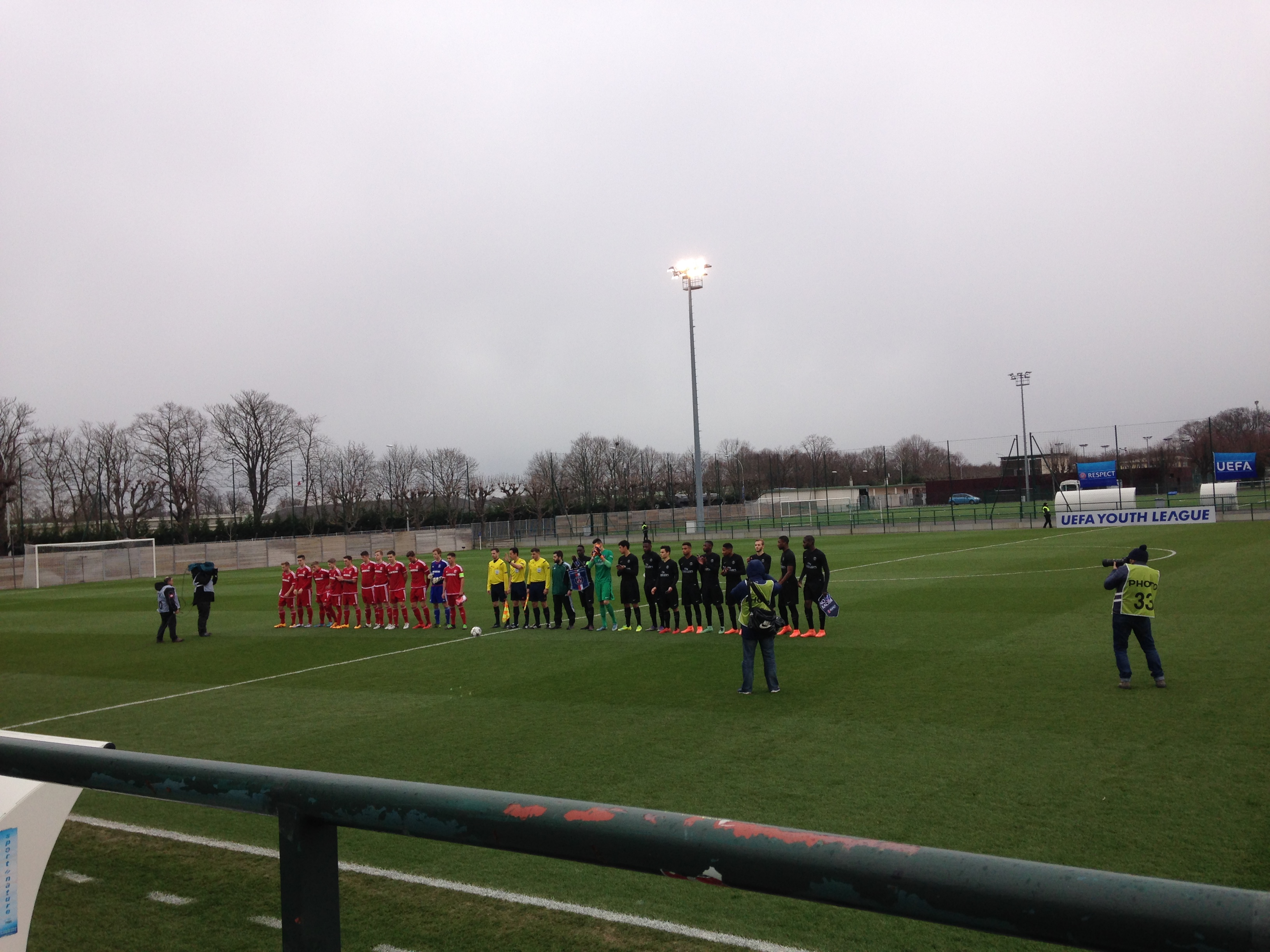 PSG-Middlesborough Youth League U19